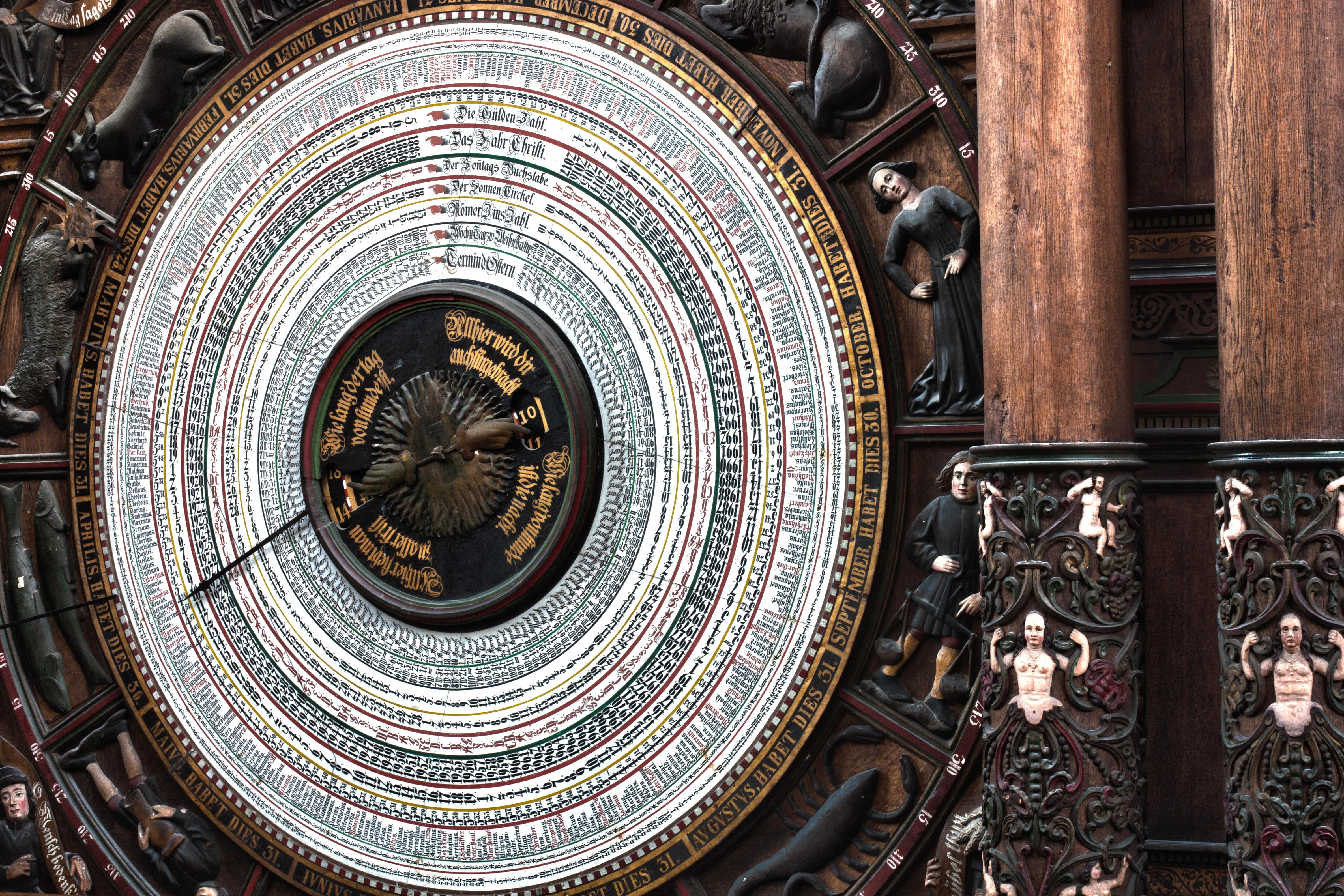 Zifferblatt der astronomischen Uhr in der Rostocker Marienkirche bis 2017. Ausschnitt der Einfassung.